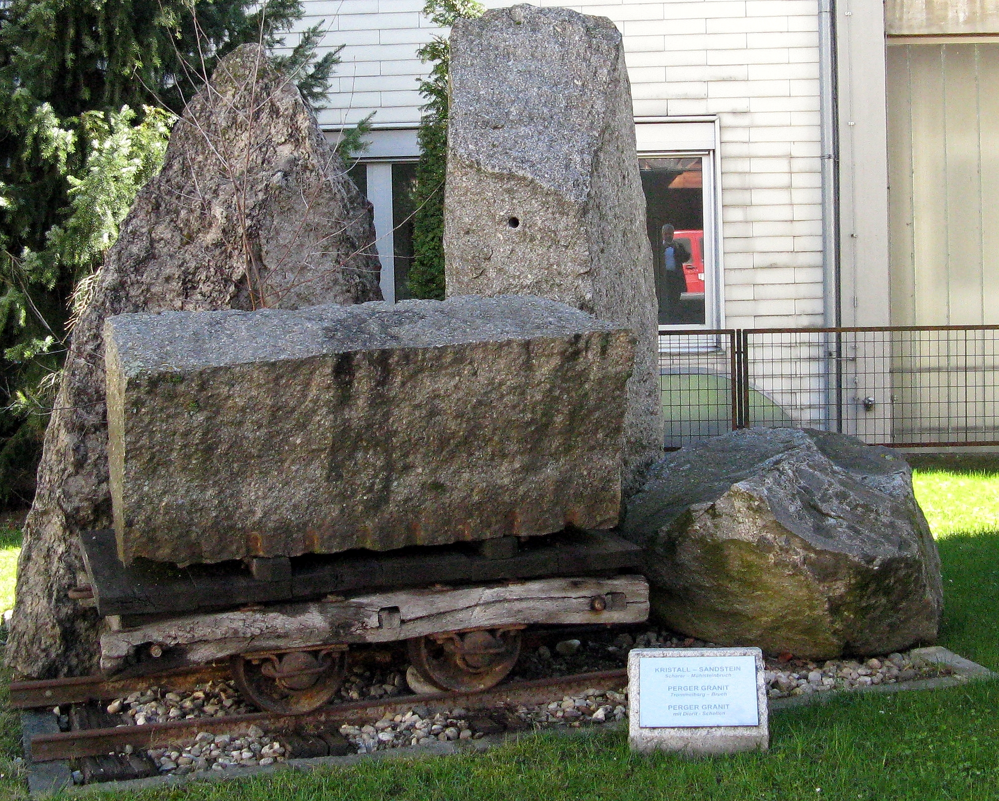 Gesteinsproben vor dem Perger Heimathaus, Kristall Sandstein aus dem Scherer Mühlsteinbruch, Perger Granit vom Trommelberg Brueh und mit Diodorit aus Schelten